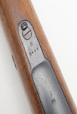 7x57mm mauser